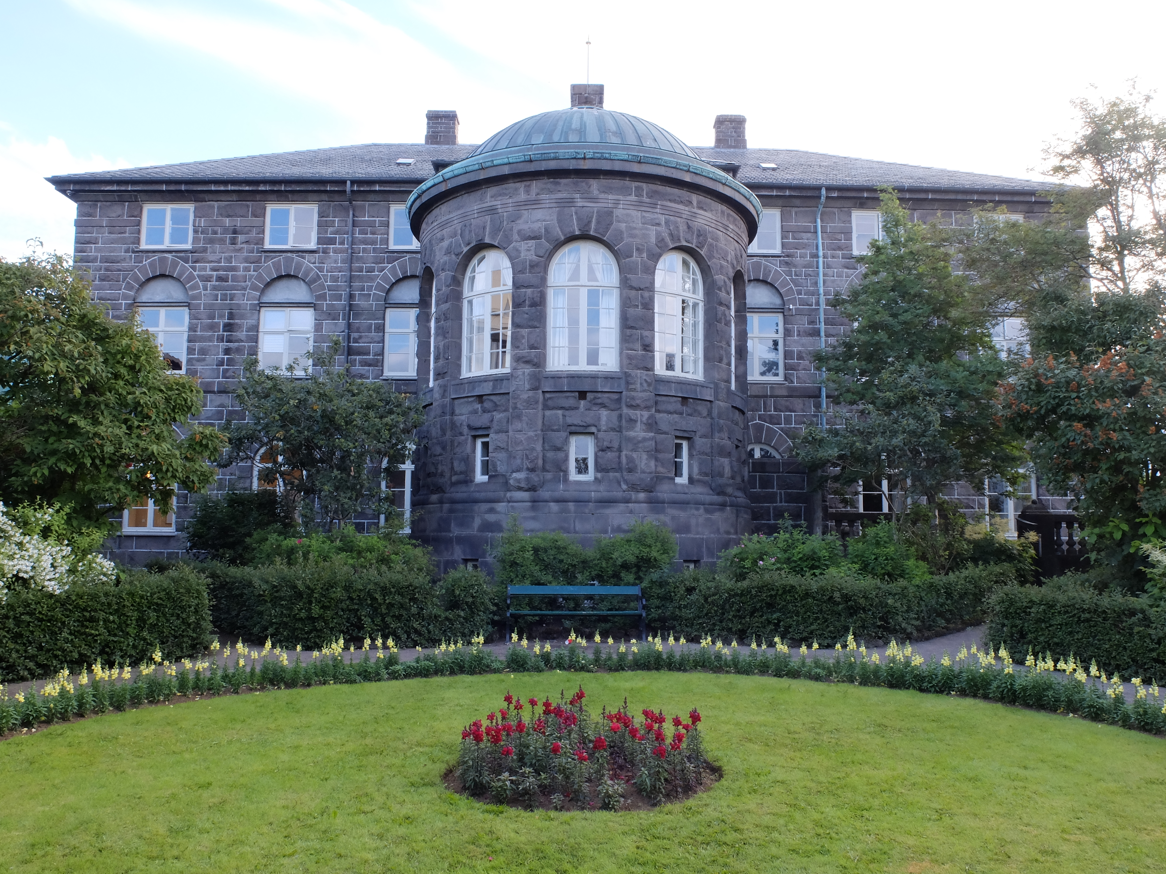 Reykjavík